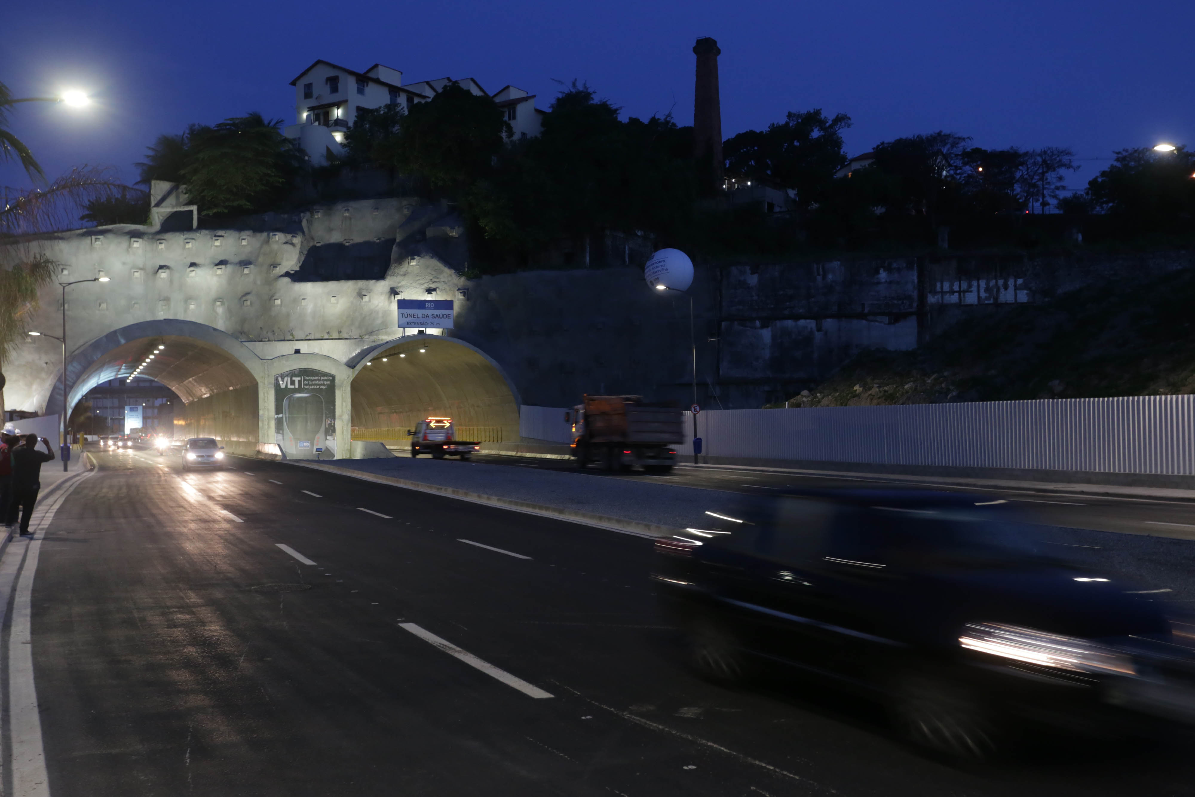 Túnel da Saúde no dia de sua inauguração.